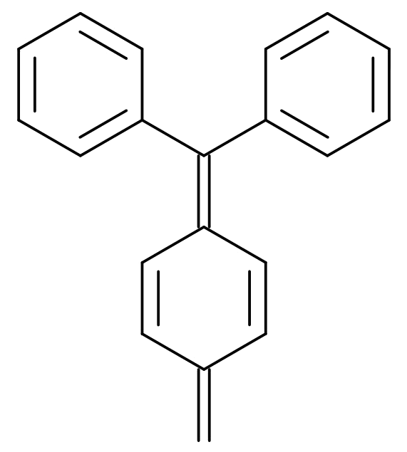 Motif de base des colorant de la famille des triarylméthane